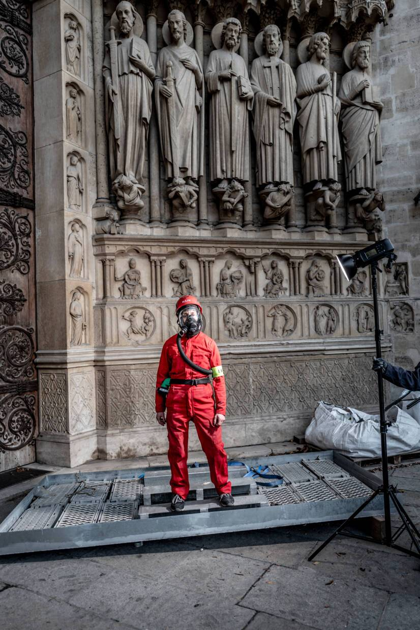 Lise Leroux, ingénieure au Laboratoire de Recherche des Monuments Historiques du ministère de la Culture, a été appelée au chevet de Notre-Dame de Paris pour expertiser l'état des pierres de la cathédrale.